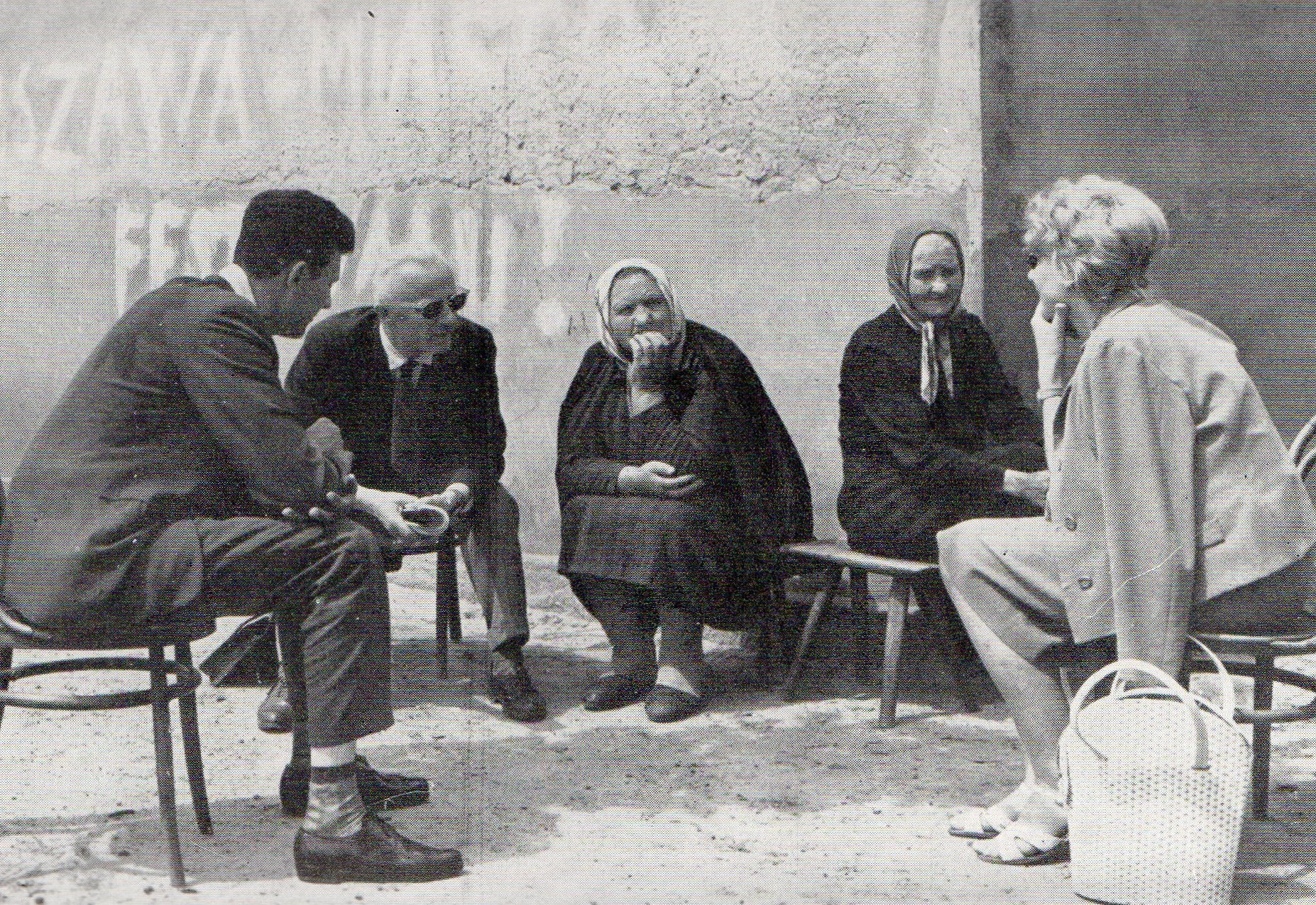 Dr Józef Burszta podczas prac etnograficznych w Kopojnie, pow. Konin. 1963r.